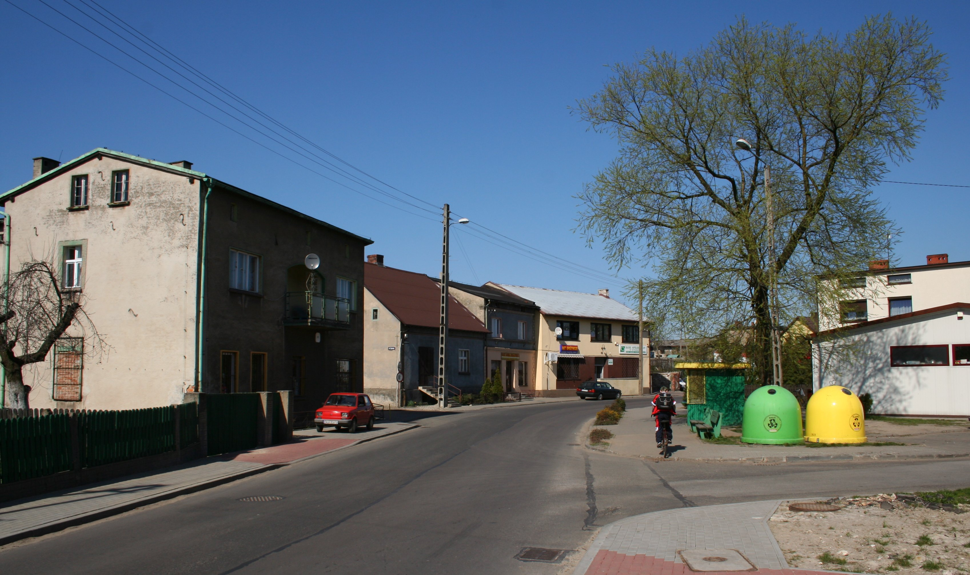 Psary - fragment centralnej części miejscowości, gmina Woźniki, powiat lubliniecki, województwo śląskie